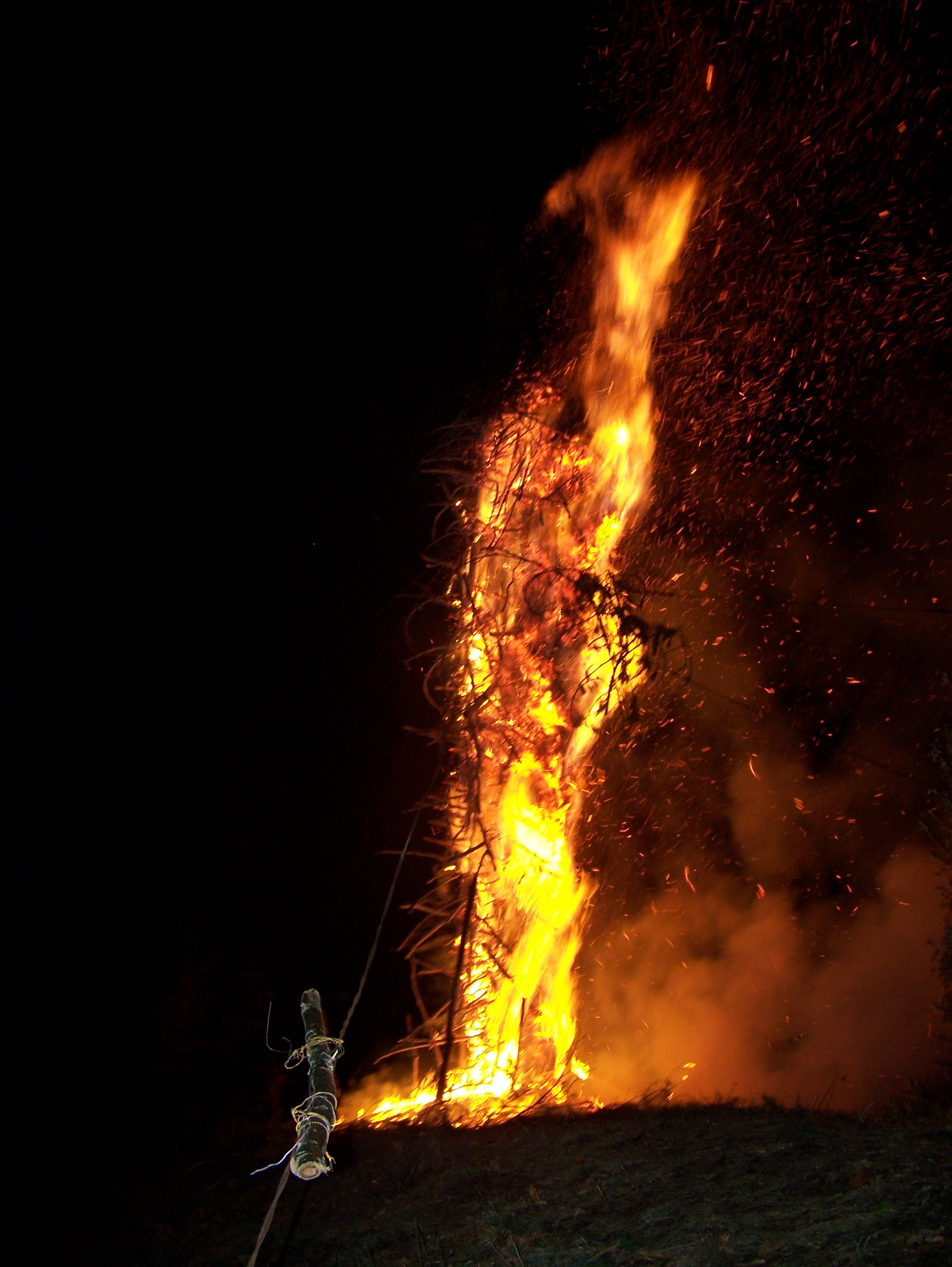 Daniele Romei (Wrukka) Falò, Santo Natale 2007 Verrucolette, Minucciano, Lucca, Italia